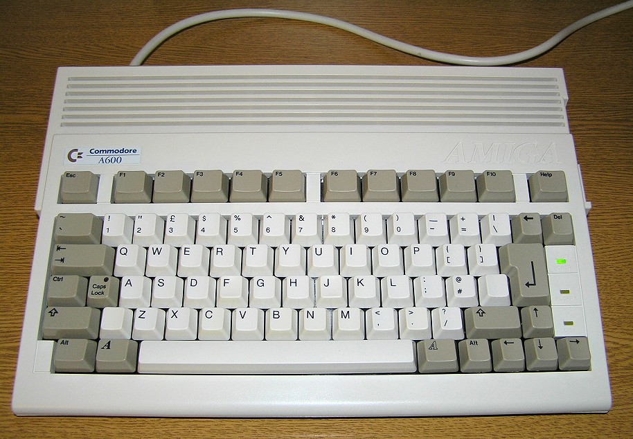 Amiga 600 computer